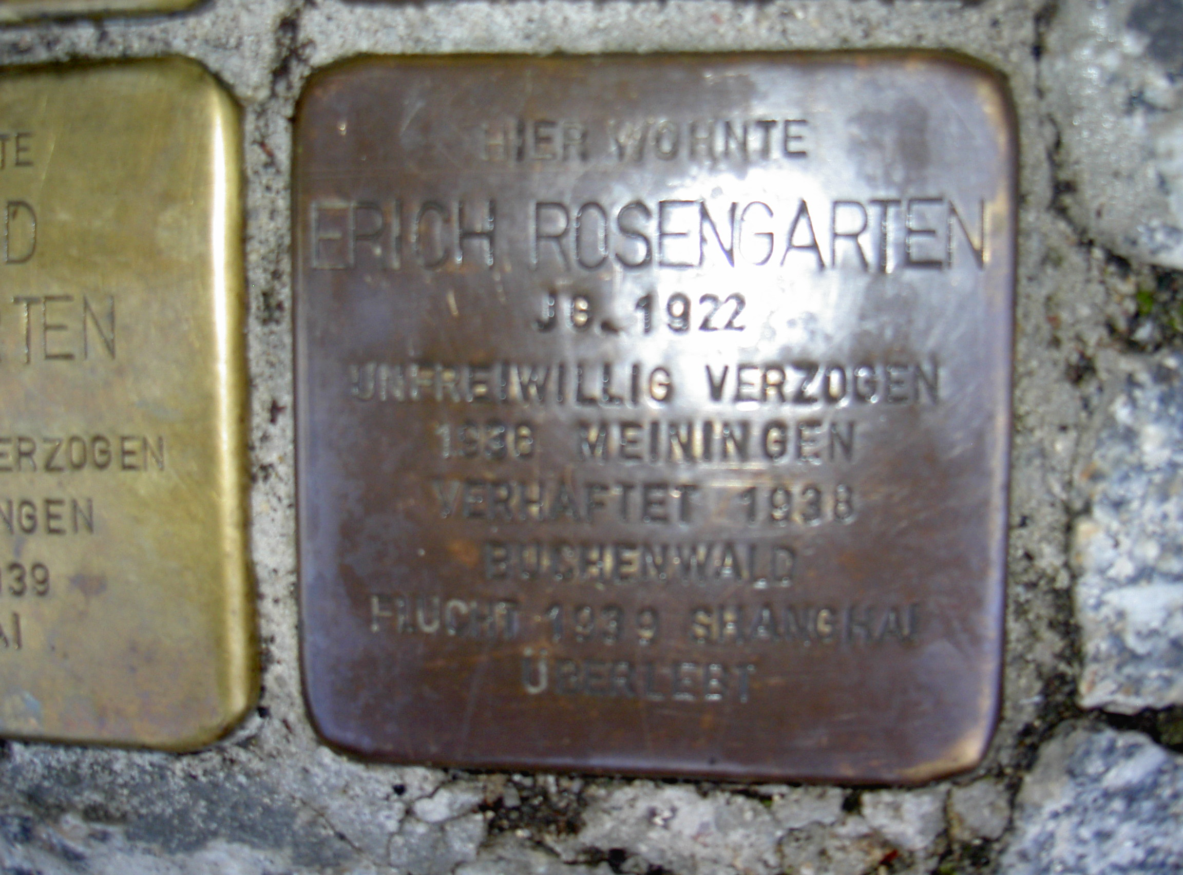 Stolperstein in Themar Rosengarten Erich